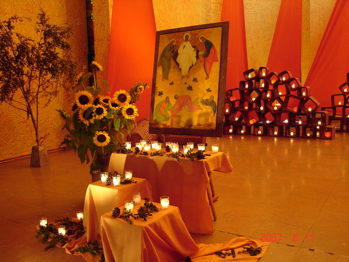 Taizéi templom belülről oltárral